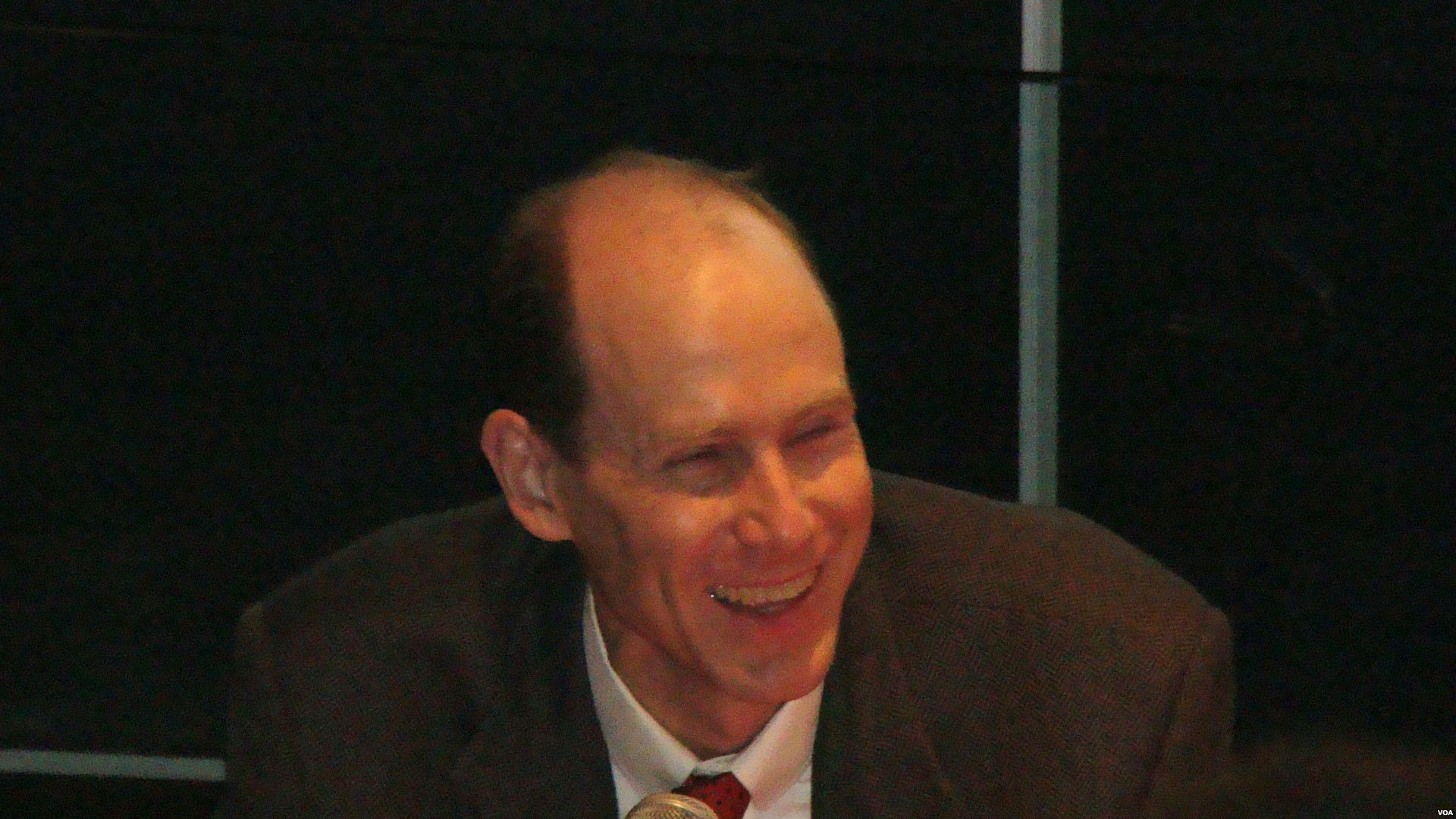 Benjamin L. Liebman